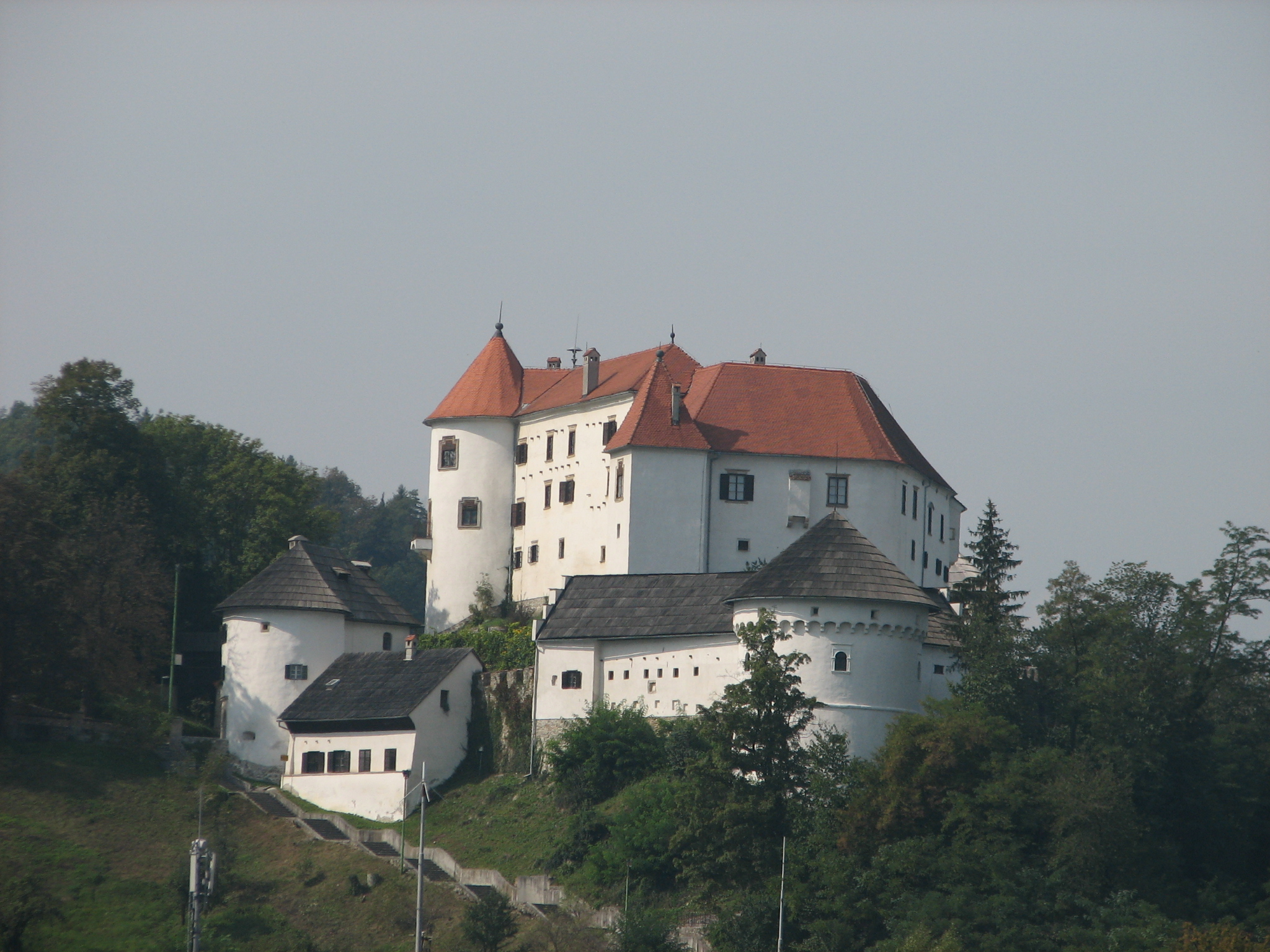 Castle of Velenje